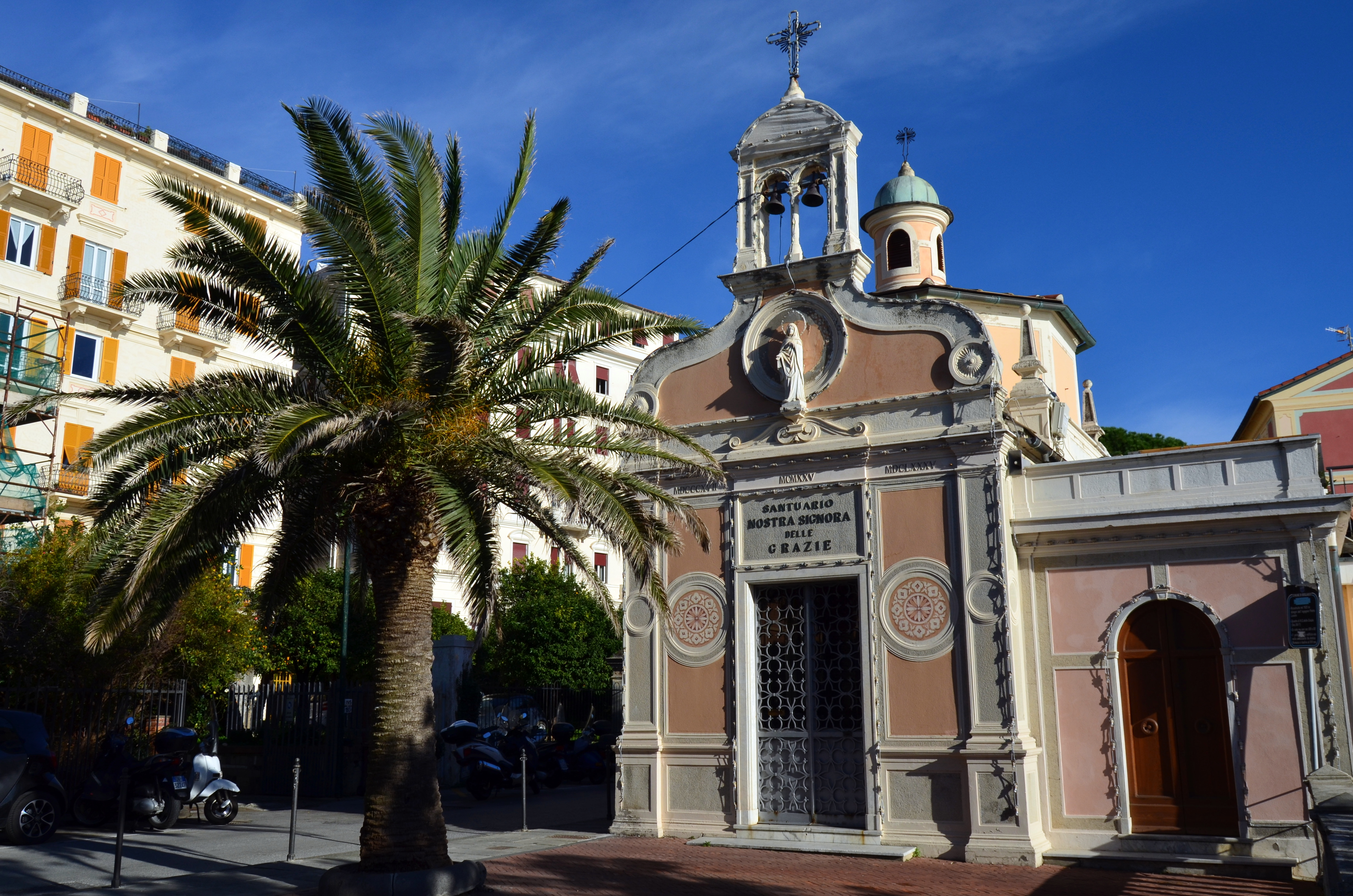 Il santuario di Nostra Signora delle Grazie, Bogliasco, Liguria, Italia